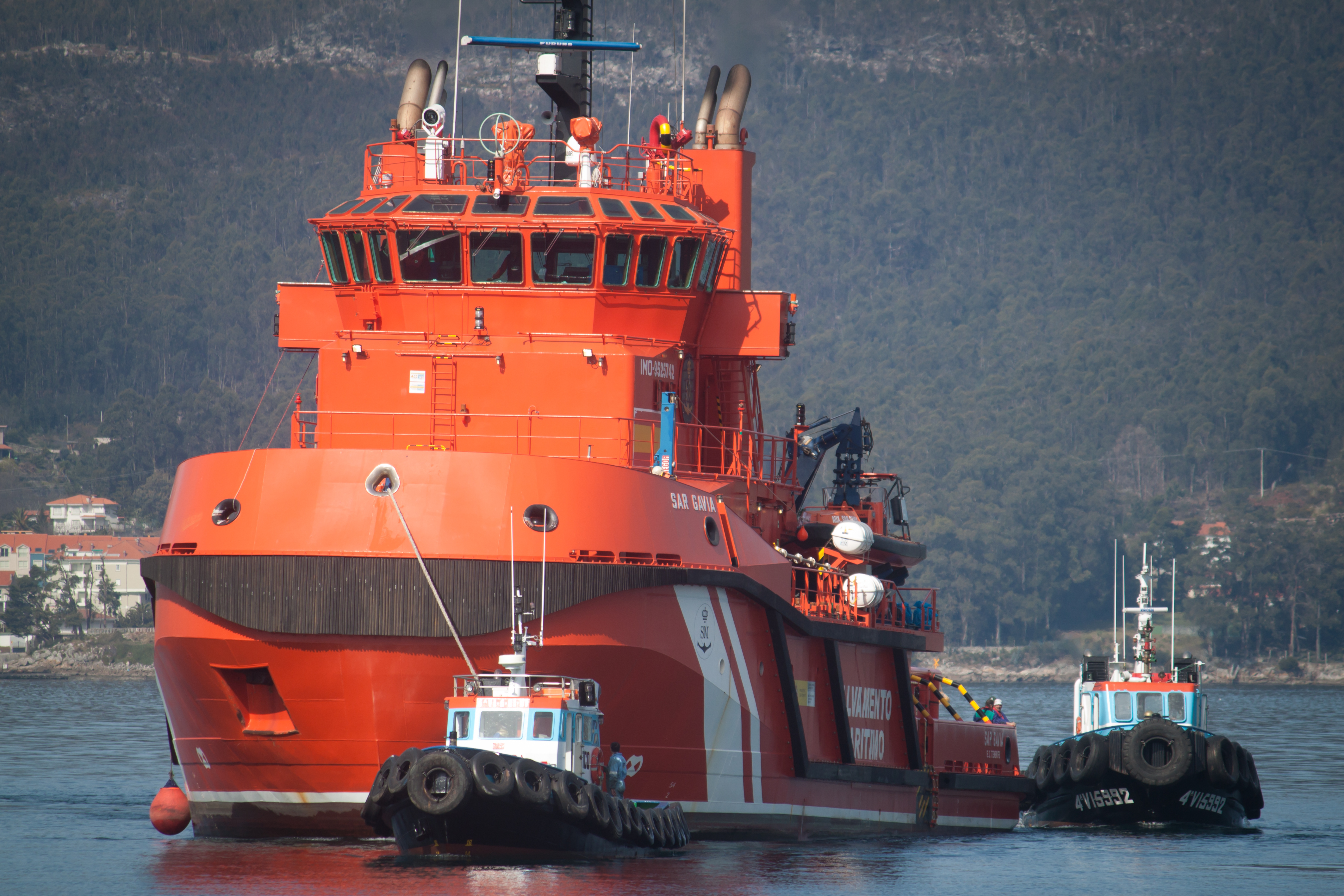 AA 3 REMOLCADORES IIII